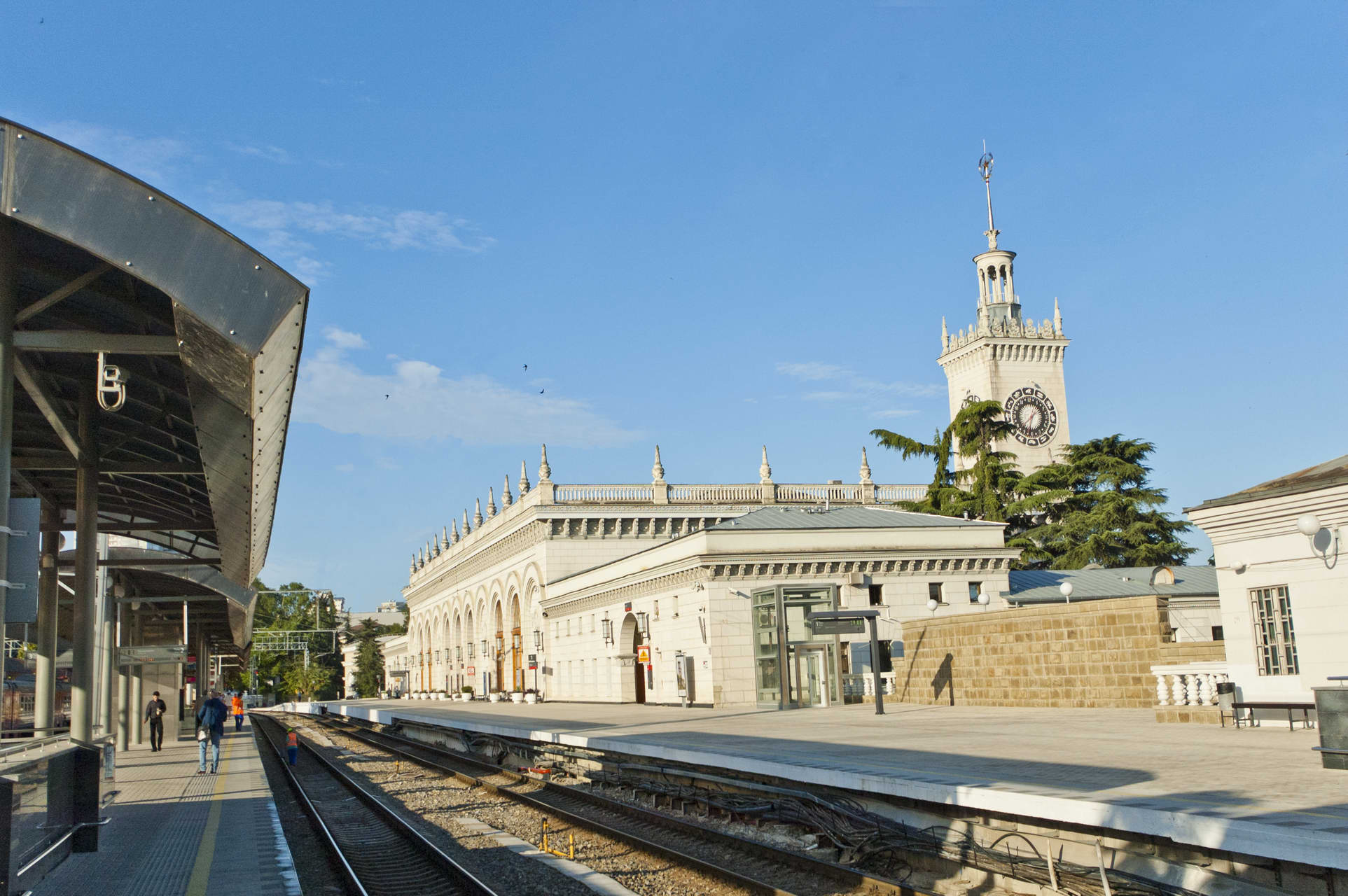 Здание железнодорожного вокзала (Краснодарский край, Сочи, центральный р-н, ж/д ст. сочи)